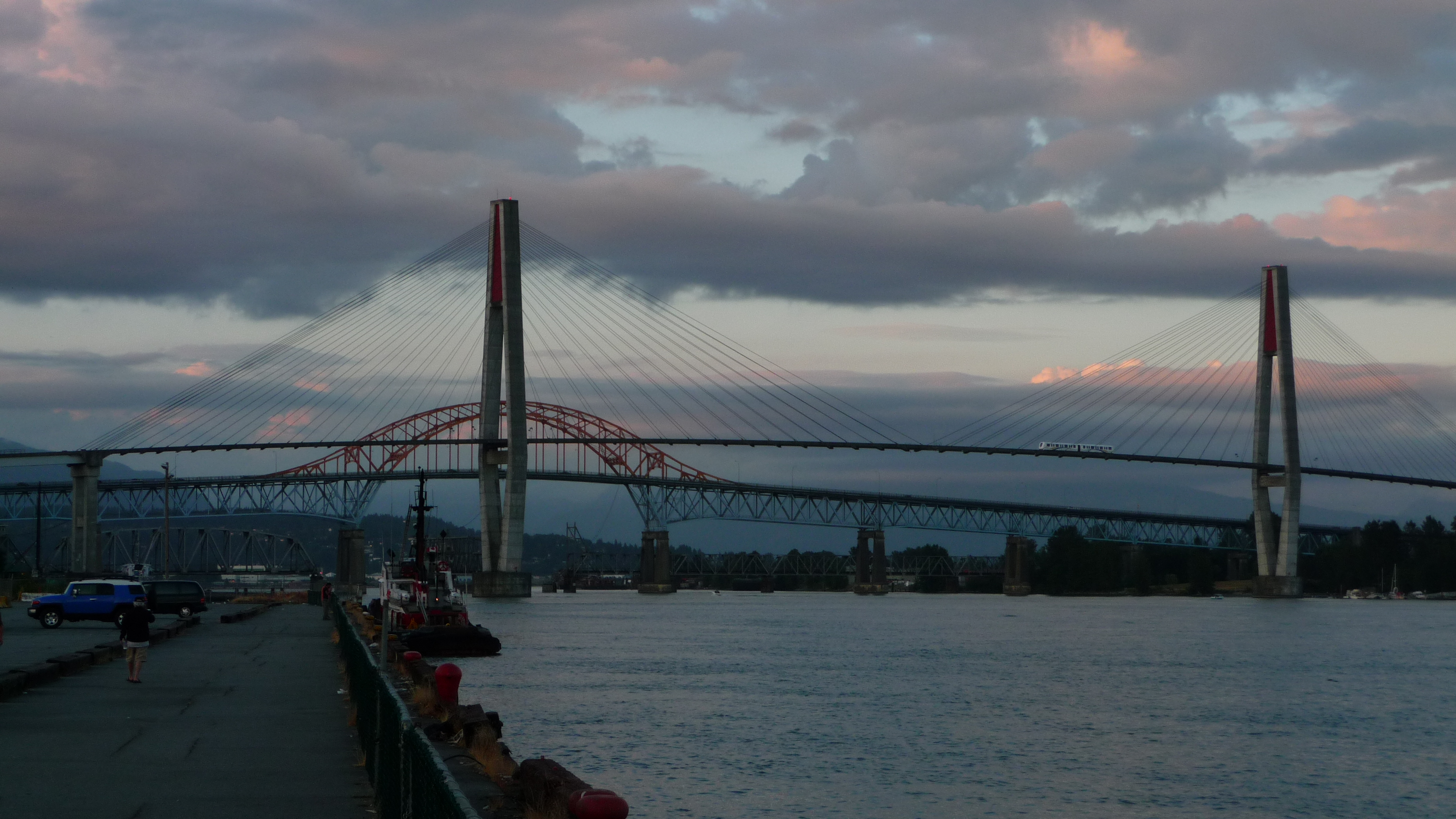 New Westminster, Bridges